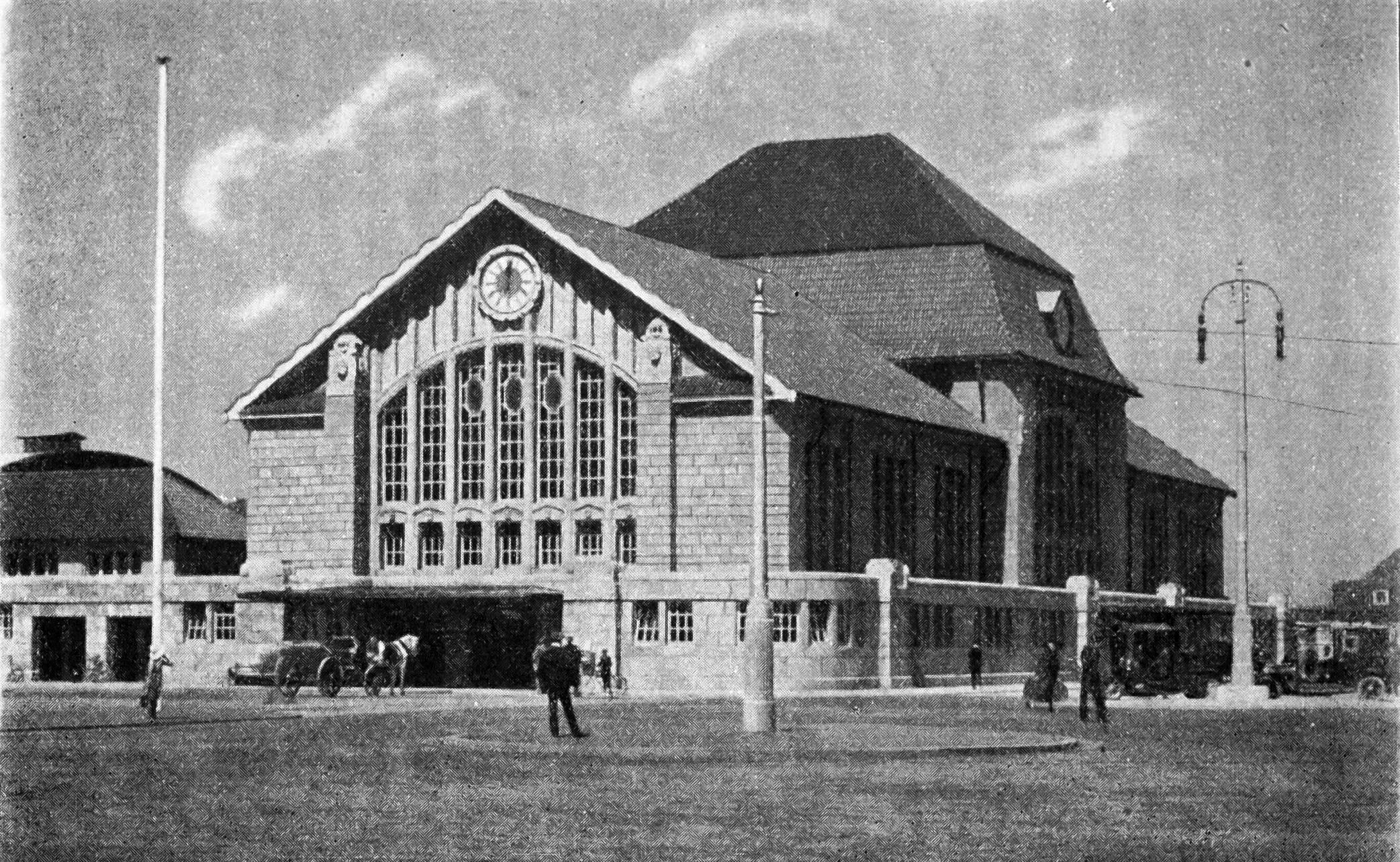 Hauptbahnhof